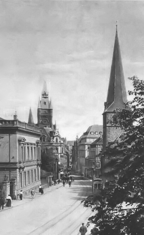 Essener Innenstadt 1921, Johanniskirche, altes Rathaus